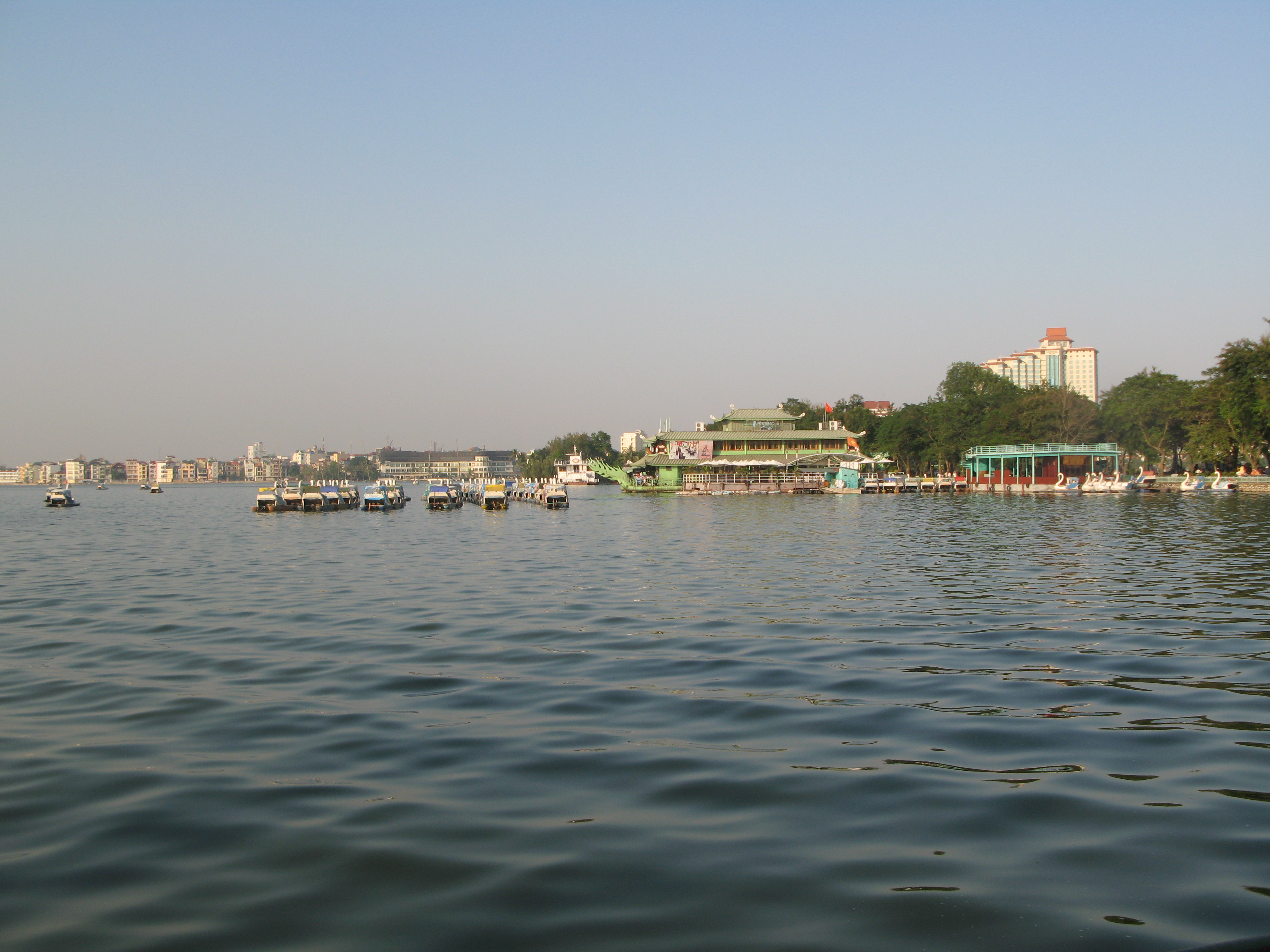 Hồ Tây, Hà Nội, Việt Nam